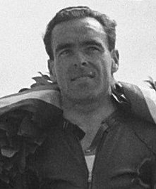 Collectie / Archief : Fotocollectie Anefo Reportage / Serie : TT Assen 1955 Beschrijving : Huldiging 350cc. Ken Kavanagh Datum : 16 juli 1955 Locatie : Assen Trefwoorden : motorsport Instellingsnaam : TT Fotograaf : Pot, Harry / Anefo Auteursrechthebbende : Nationaal Archief Materiaalsoort : Negatief (zwart/wit) Nummer archiefinventaris : bekijk toegang 2.24.01.04 Bestanddeelnummer : 907-2368